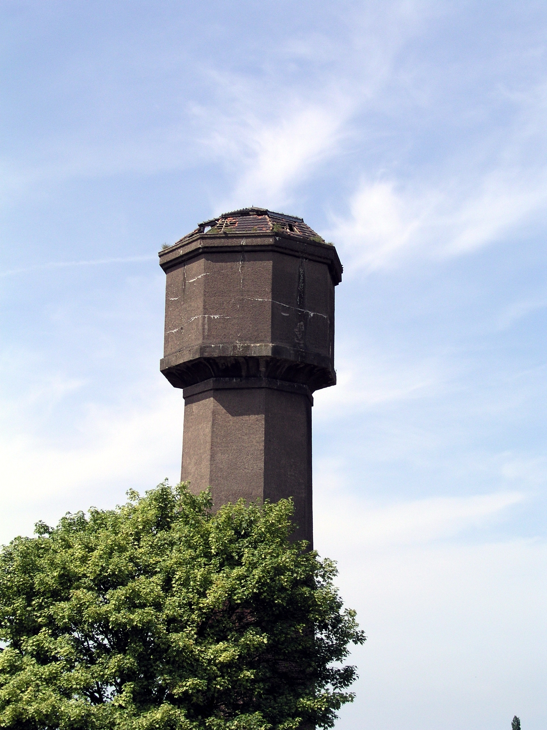 Wasserturm im Stahlwerk Becker, Willich, Wahrzeichen des Stahlwerkes